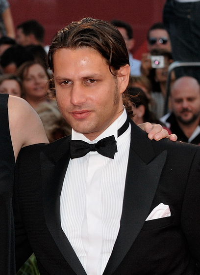 Adam Bousdoukos auf den 66. Filmfestspielen von Venedig